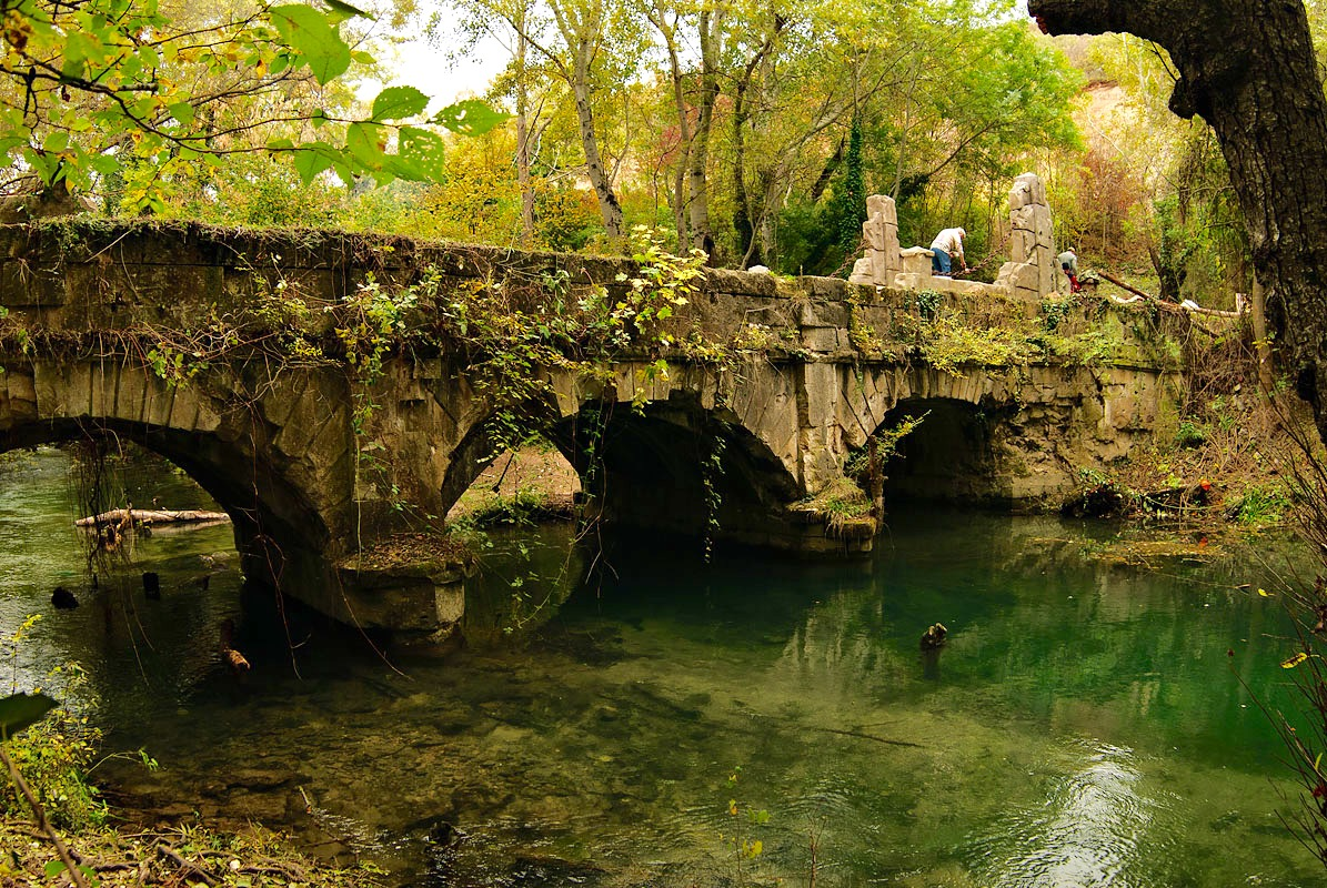 Акведук через Чёрную реку у села Хмельницкое. Снят во время подготовки к съёмкам кинофильма «Ржевский против Наполеона».